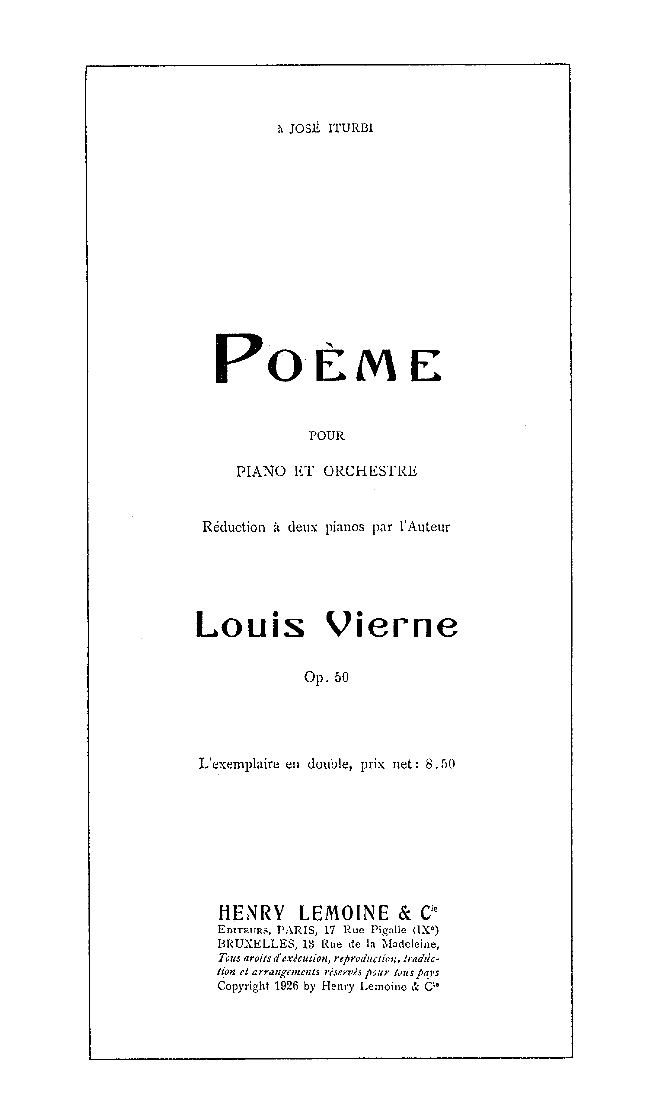 Louis Vierne - Poème pour piano et orchestre (page de titre)